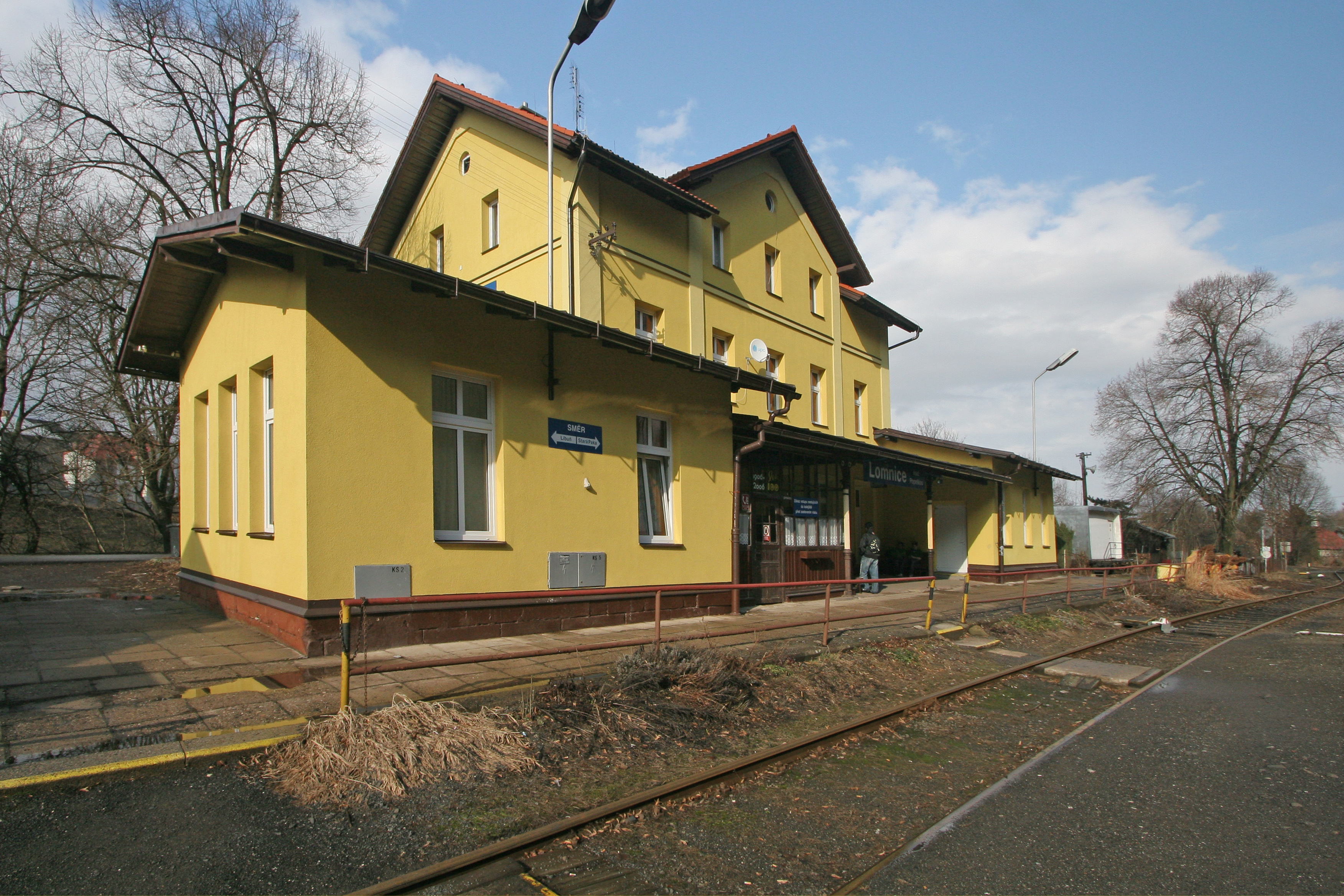 Lomnice nad Popelkou - nádraží